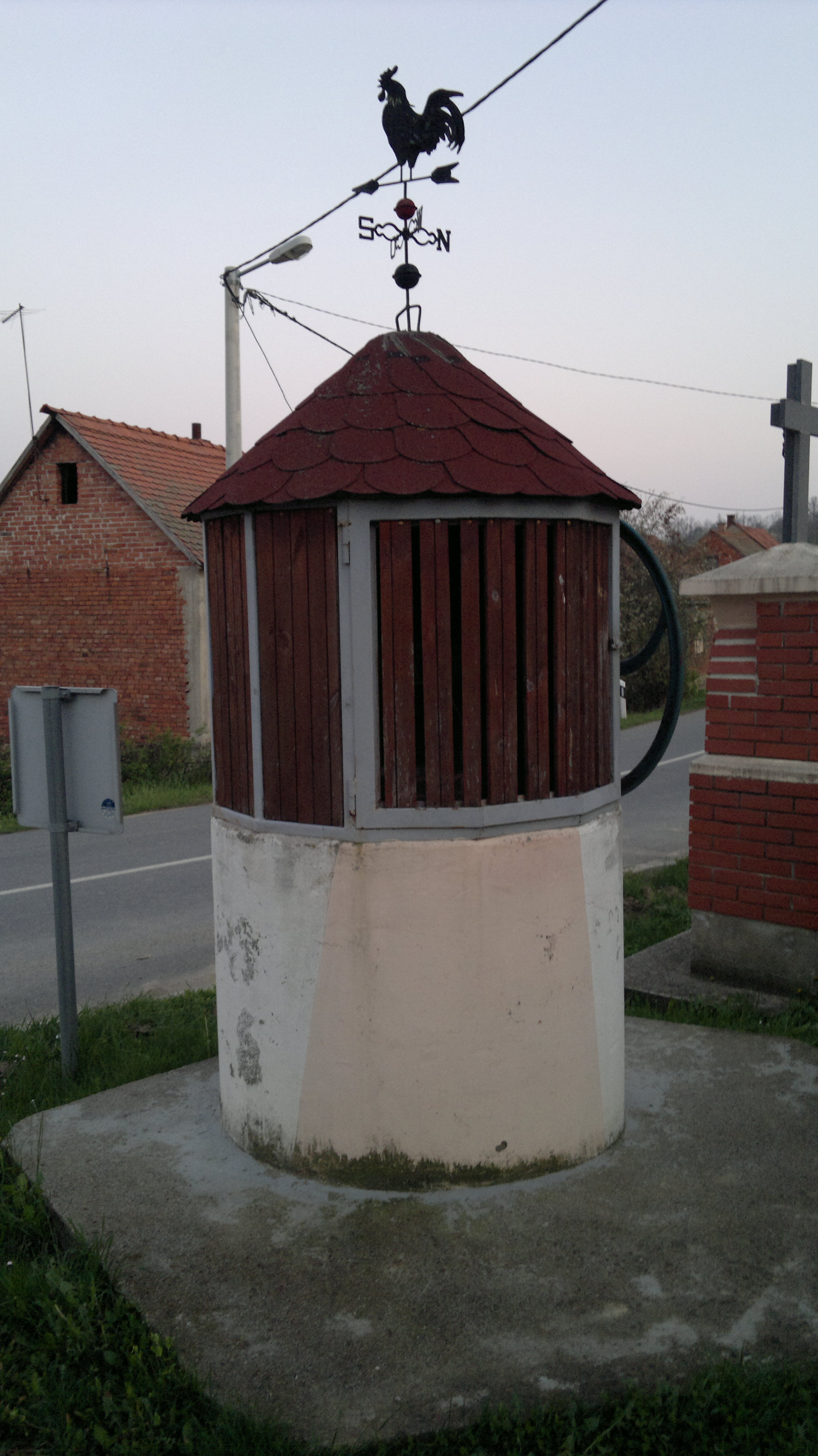 Gradski Vrhovci, Croatia